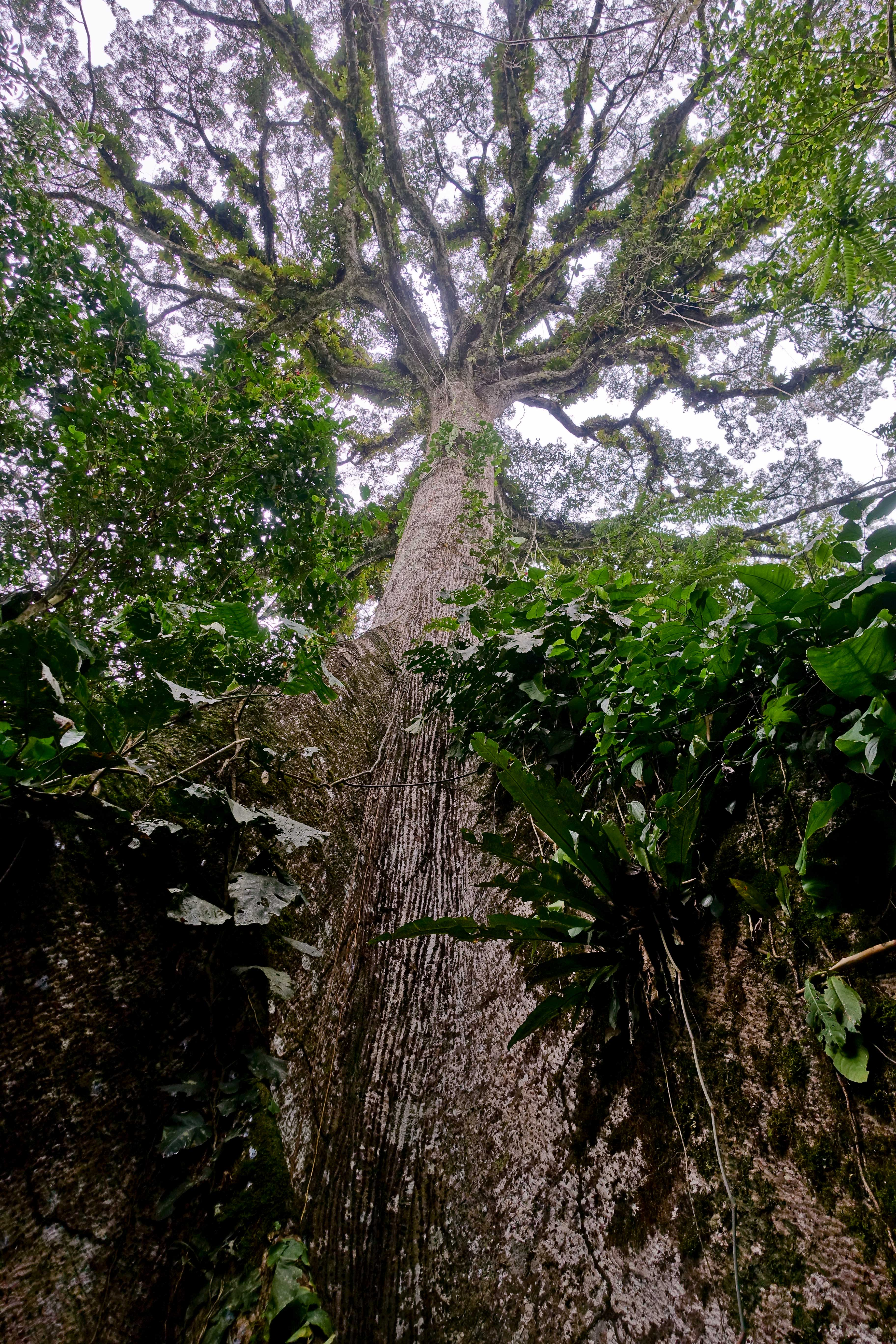 Kapokbaum, San Victoriano Siona Village, Cuyabeno-Reservat, Sucumbíos, Ecuador